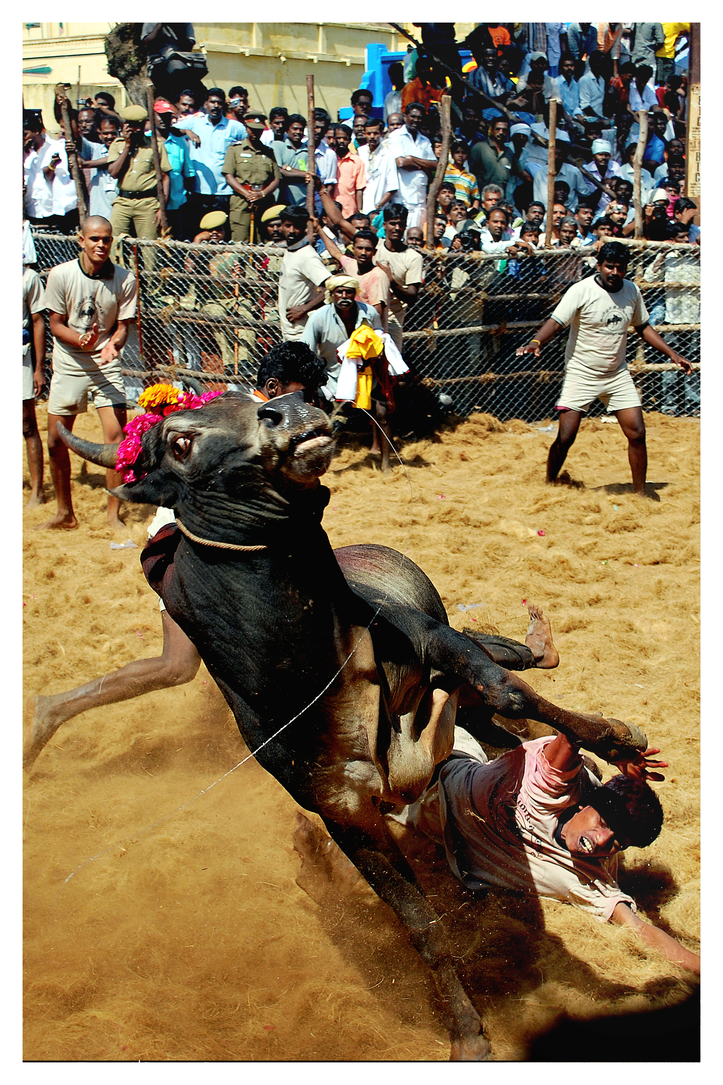 ஜல்லிக்கட்டு-தமிழர் வீர விளையாட்டு...